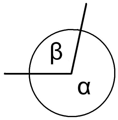 Ângulo replementar